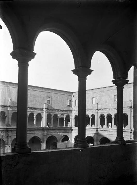 Imatge